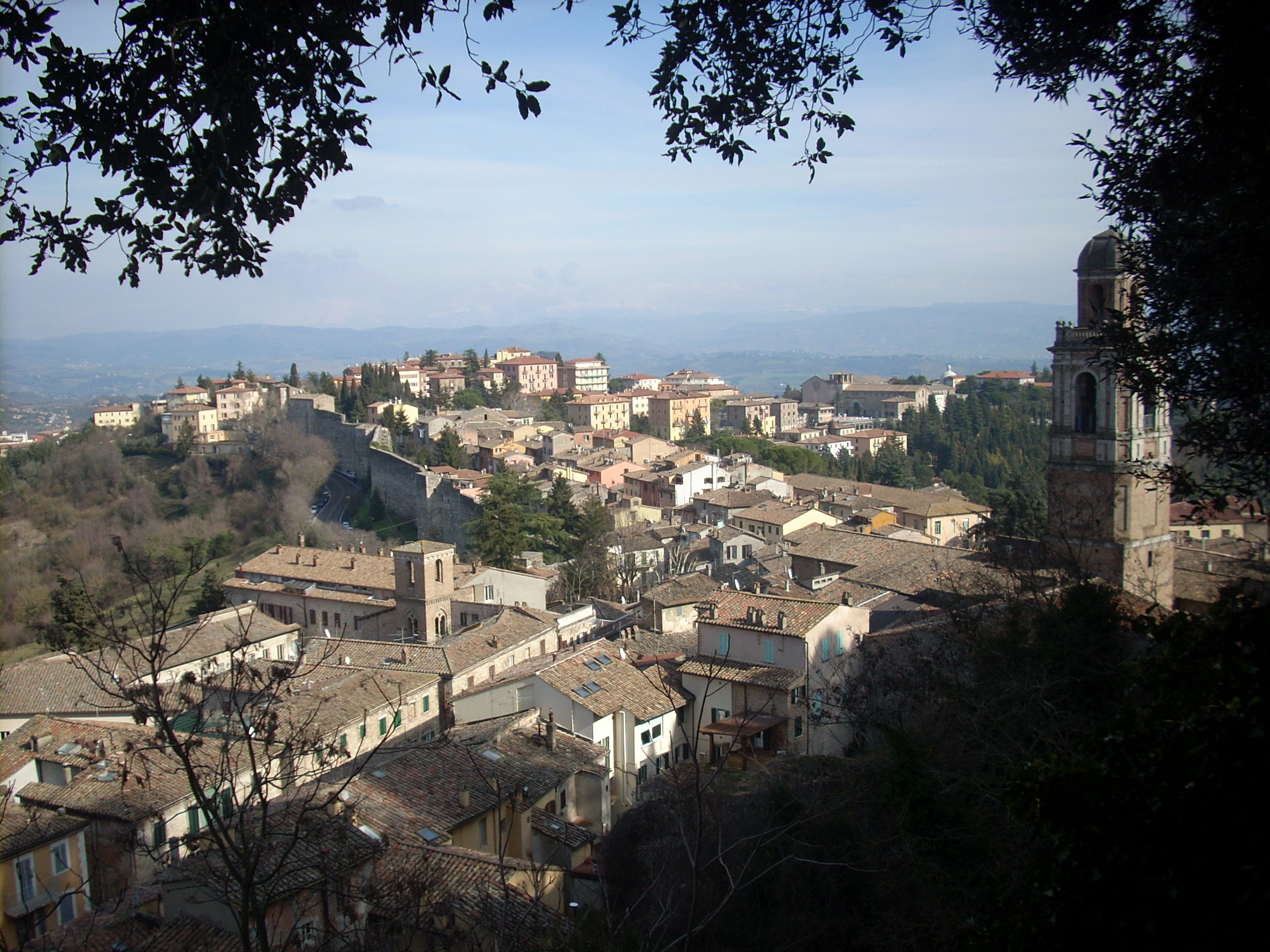 Veduta di Perugia da Porta Sole.